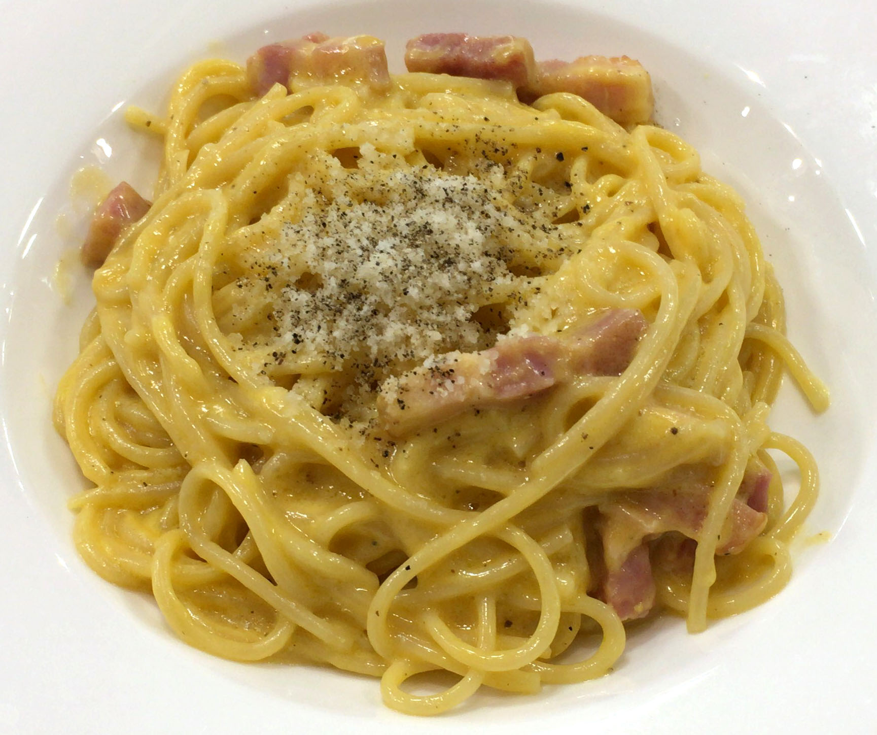 イタリアントマトカフェ カルボナーラ（770円）